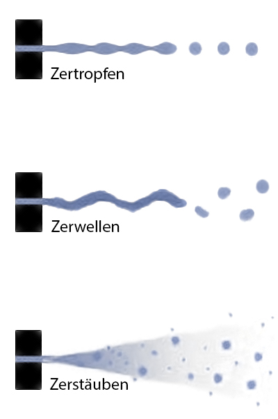 Verschiedene Zerfallsbereiche von Flüssigkeitsstrahlen